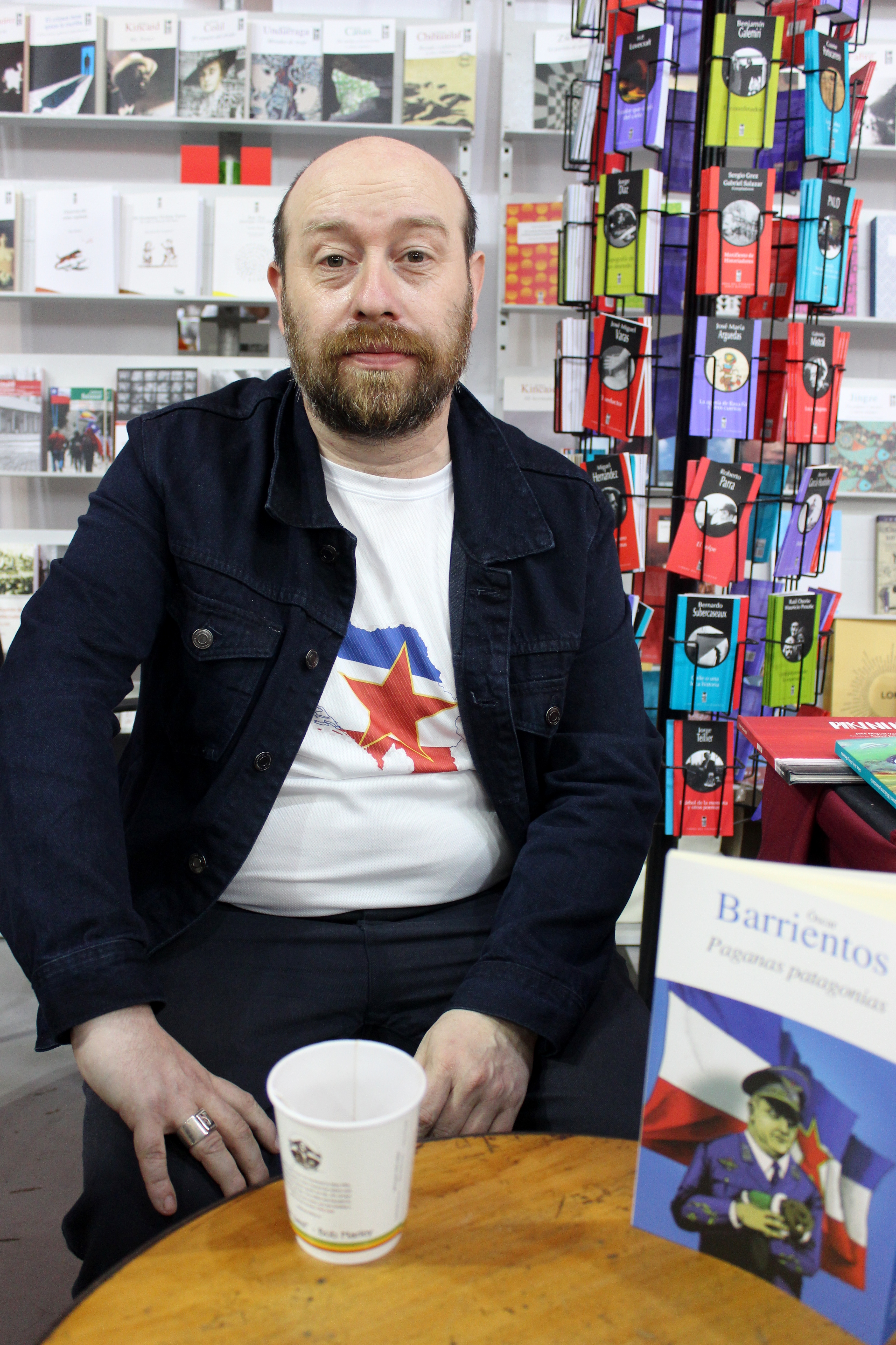 El escritor chileno Óscar Barrientos en el stand de LOM en la Feria Internacional del Libro de Santiago 2018.